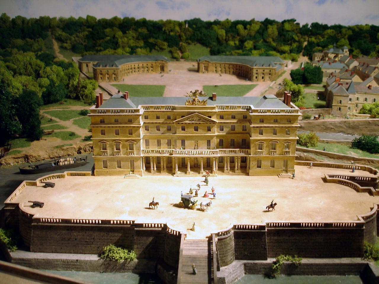 Musée Louis-Senlecq - Maquette du château de Conti à L'Isle-Adam (Val-d'Oise), France